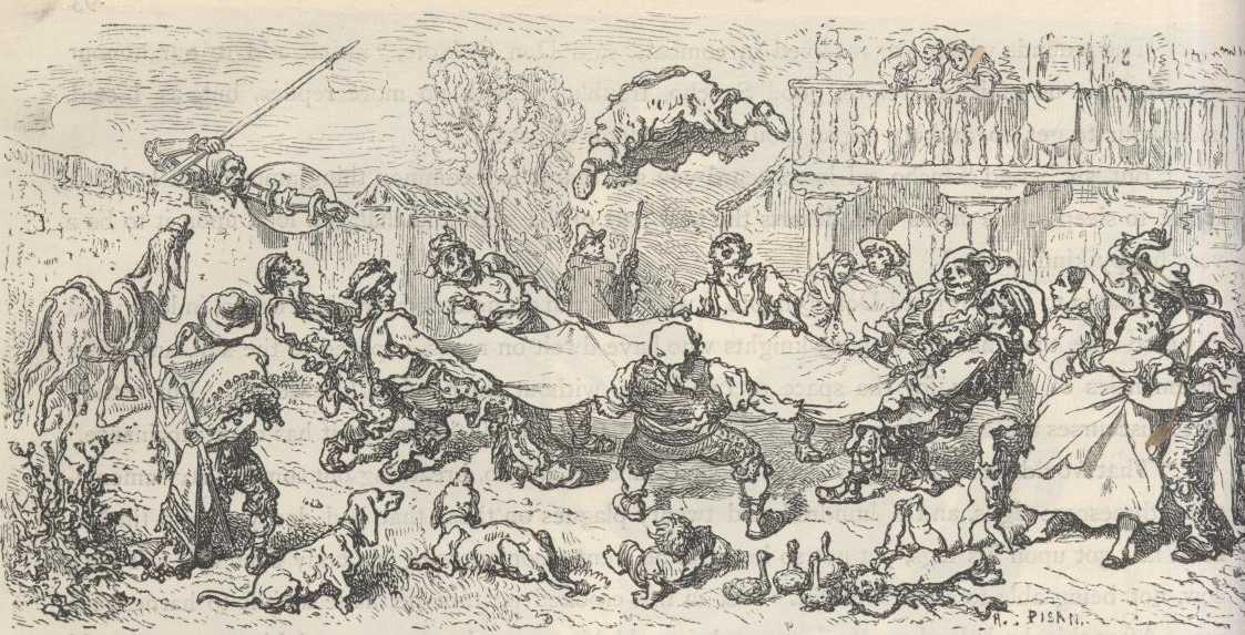 Sancho Pança é lançado ao ar